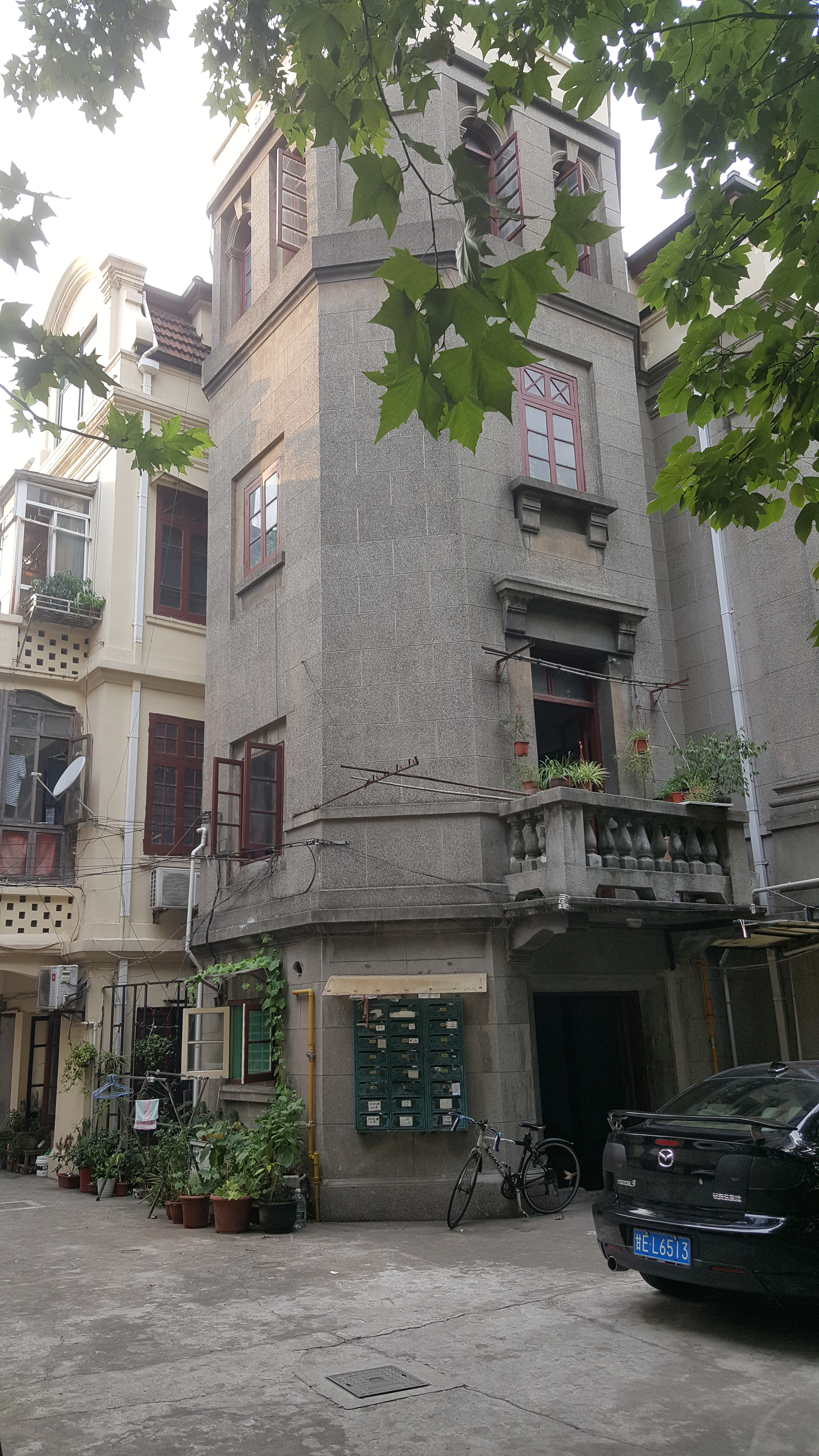 中文（中国大陆）: 武康路392号住宅是上海市第五批优秀历史建筑